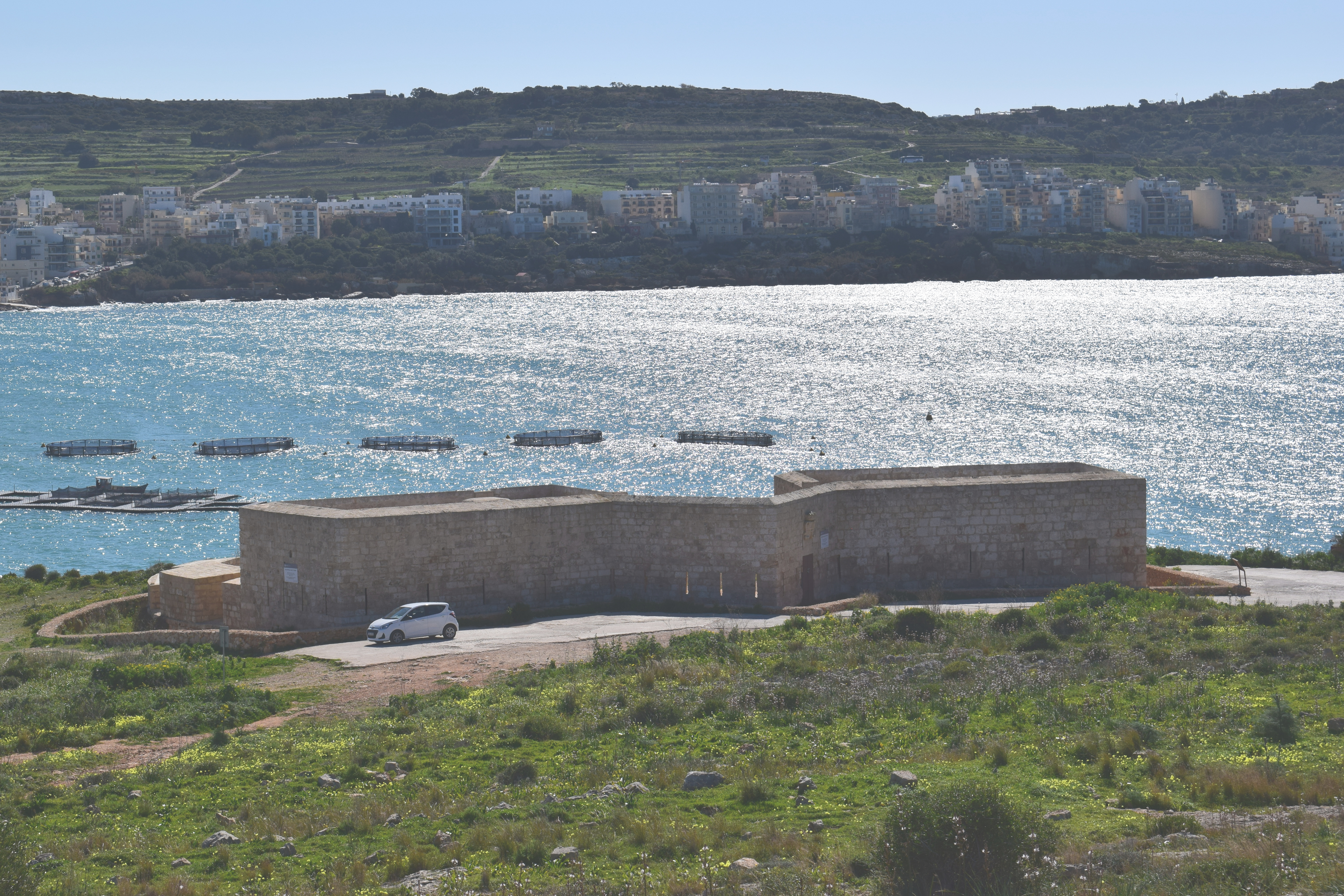 Mistra Battery, Mellieħa, Malta.